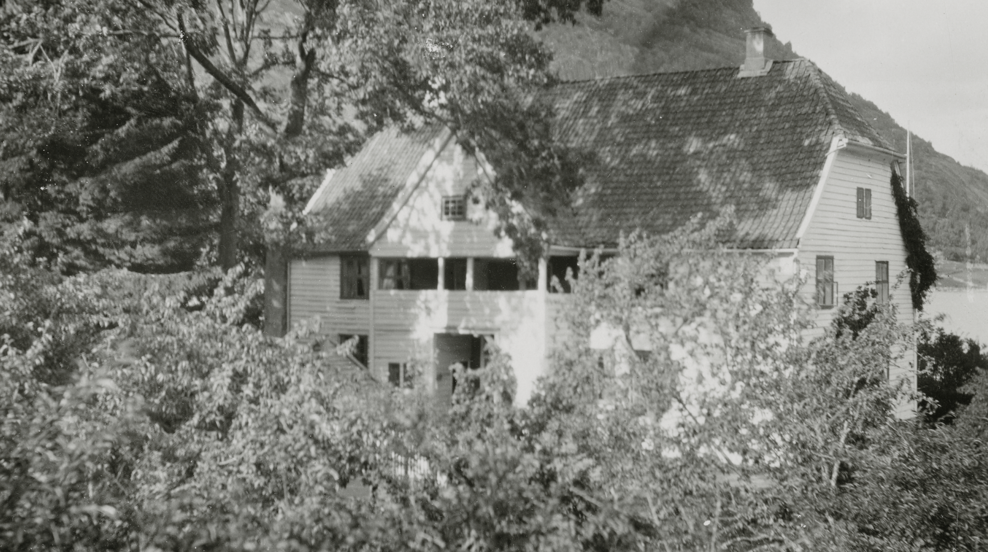 Christianelyst, Christianeslyst i Solvorn, Sogn og Fjordane